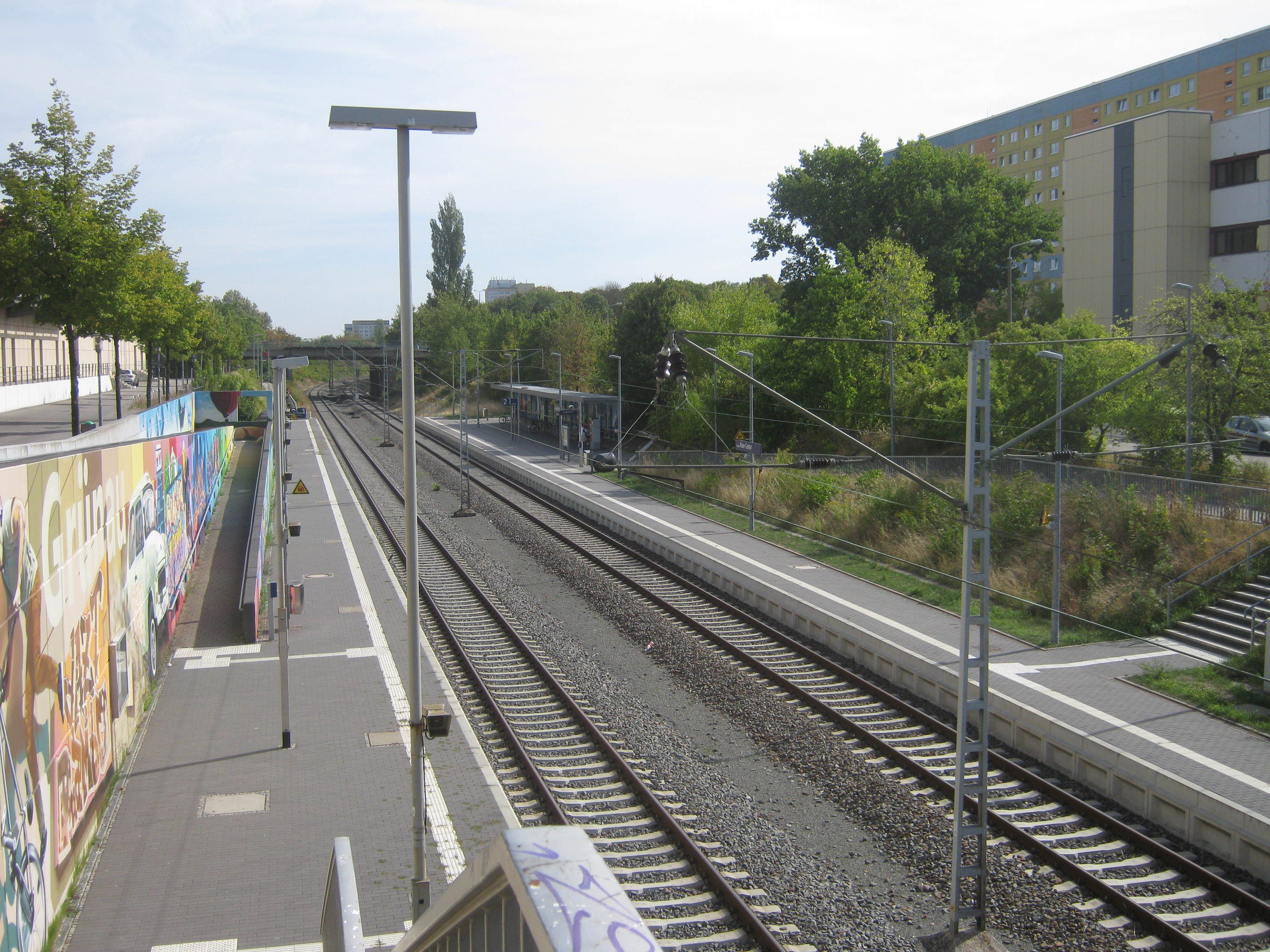 Zur Bahnstrecke Leipzig-Plagwitz–Leipzig Miltitzer Allee gehört der Haltepunkt Leipzig Allee-Center, welcher nach dem in der direkten nähe befindlichen Einkaufszentrum benannt ist. Früher trug der Haltepunkt, welcher 1980 eröffnet wurde und zuvor die Namen „Leipzig Wilhelm-Pieck-Allee“ (1980–1991) und „Leipzig Stuttgarter Allee“ (1991–2002) getragen hat.